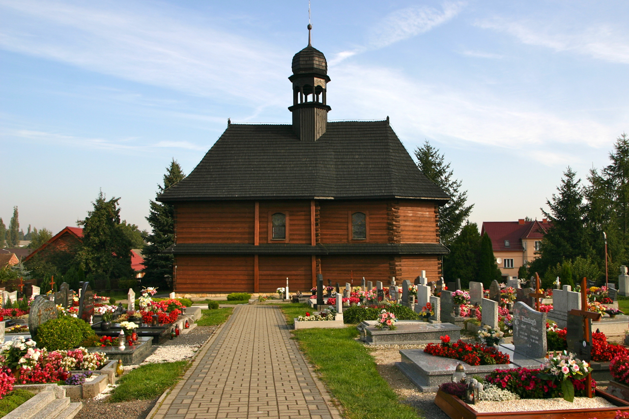 Rzepcze (dodatkowa nazwa w j. niem. Repsch) – wieś w Polsce położona w województwie opolskim, w w powiecie prudnickim, w gminie Głogówek.